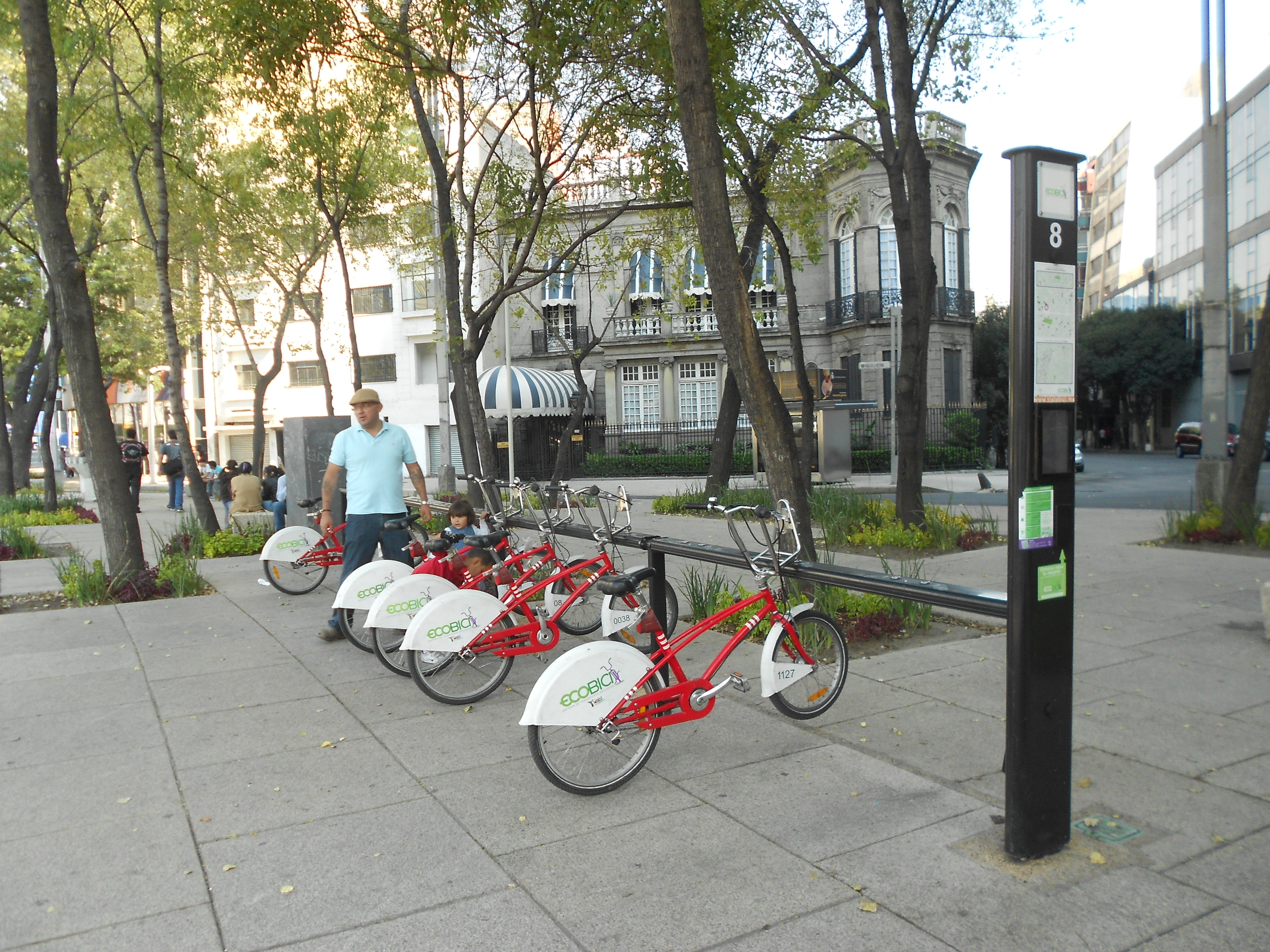 Módulo de EcoBici ubicado en la colonia Condesa en la Ciudad de México